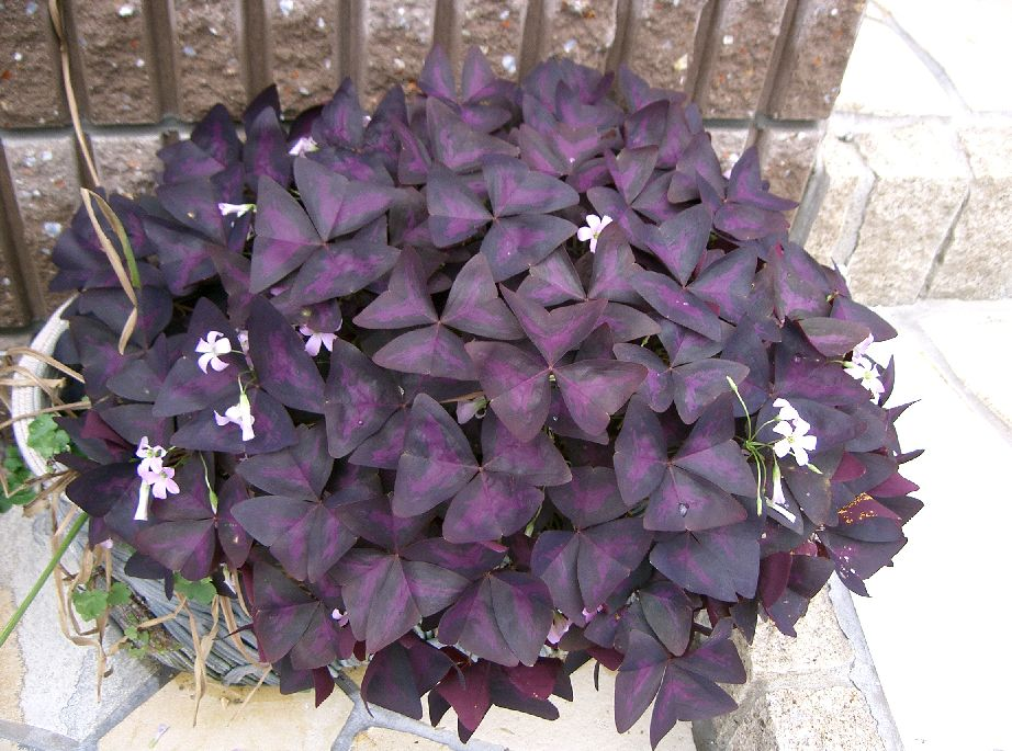 Oxalis triangularis